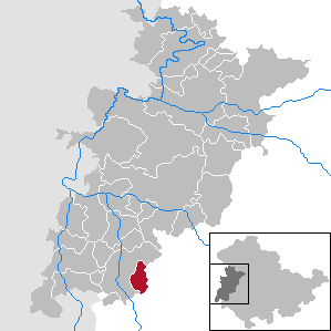 Wiesenthal in Thuringia - Wartburgkreis